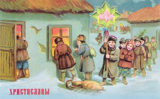 Рождественская открытка.